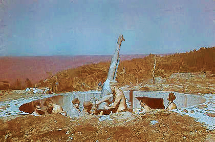 Saksalainen 88 mm. ilmatorjuntakanuuna betonisessa tuliasemassa kesällä 1943.